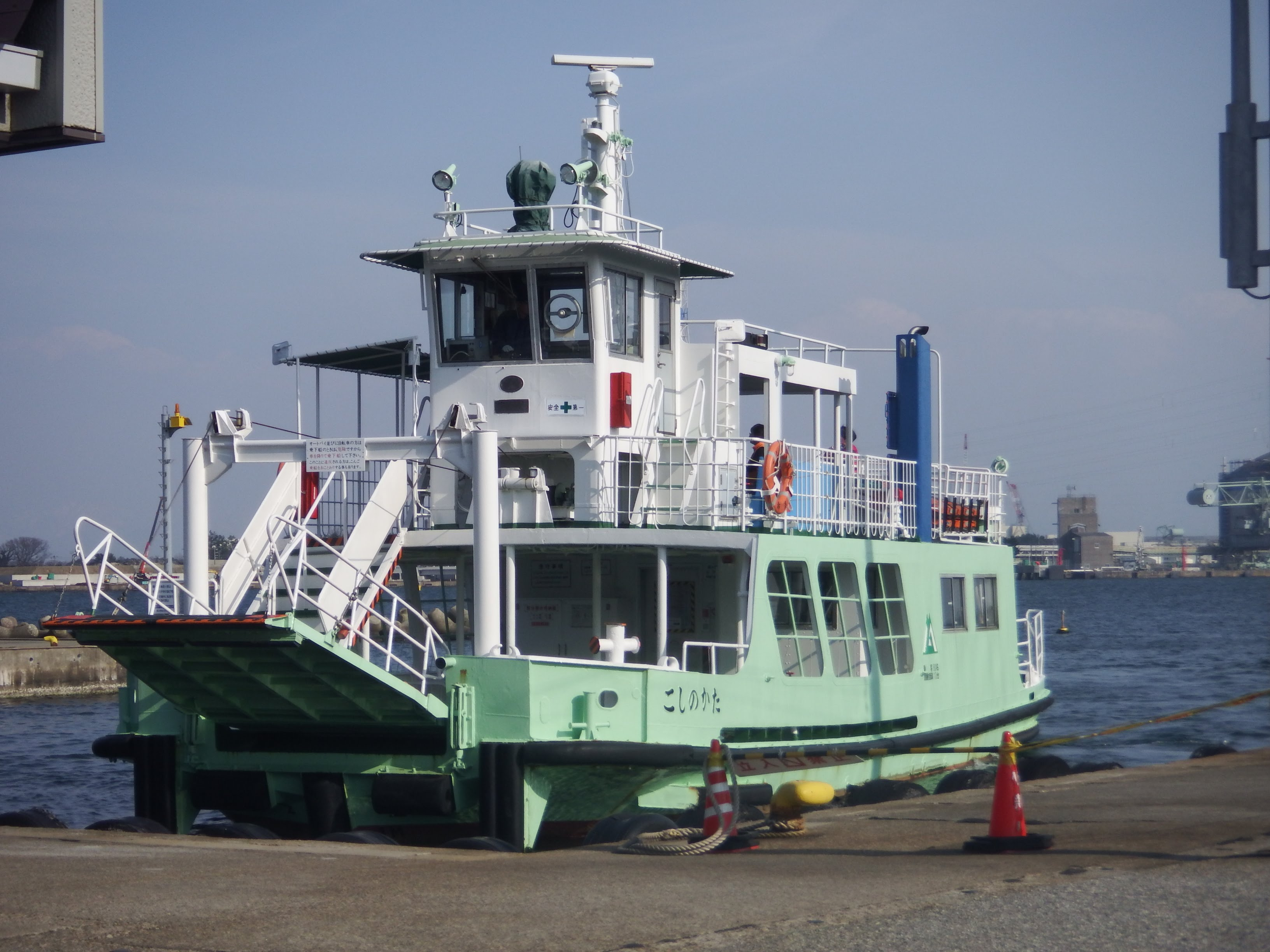 越ノ潟フェリーに利用される「こしのかた」です